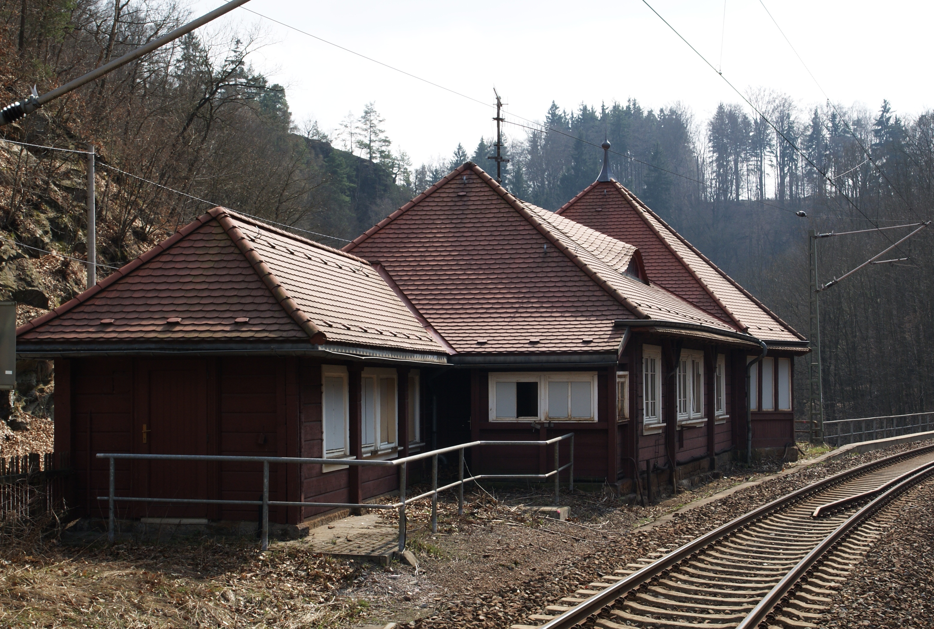 Denkmalgeschütztes Bahnhofsgebäude (Blockhaus) in Edle Krone